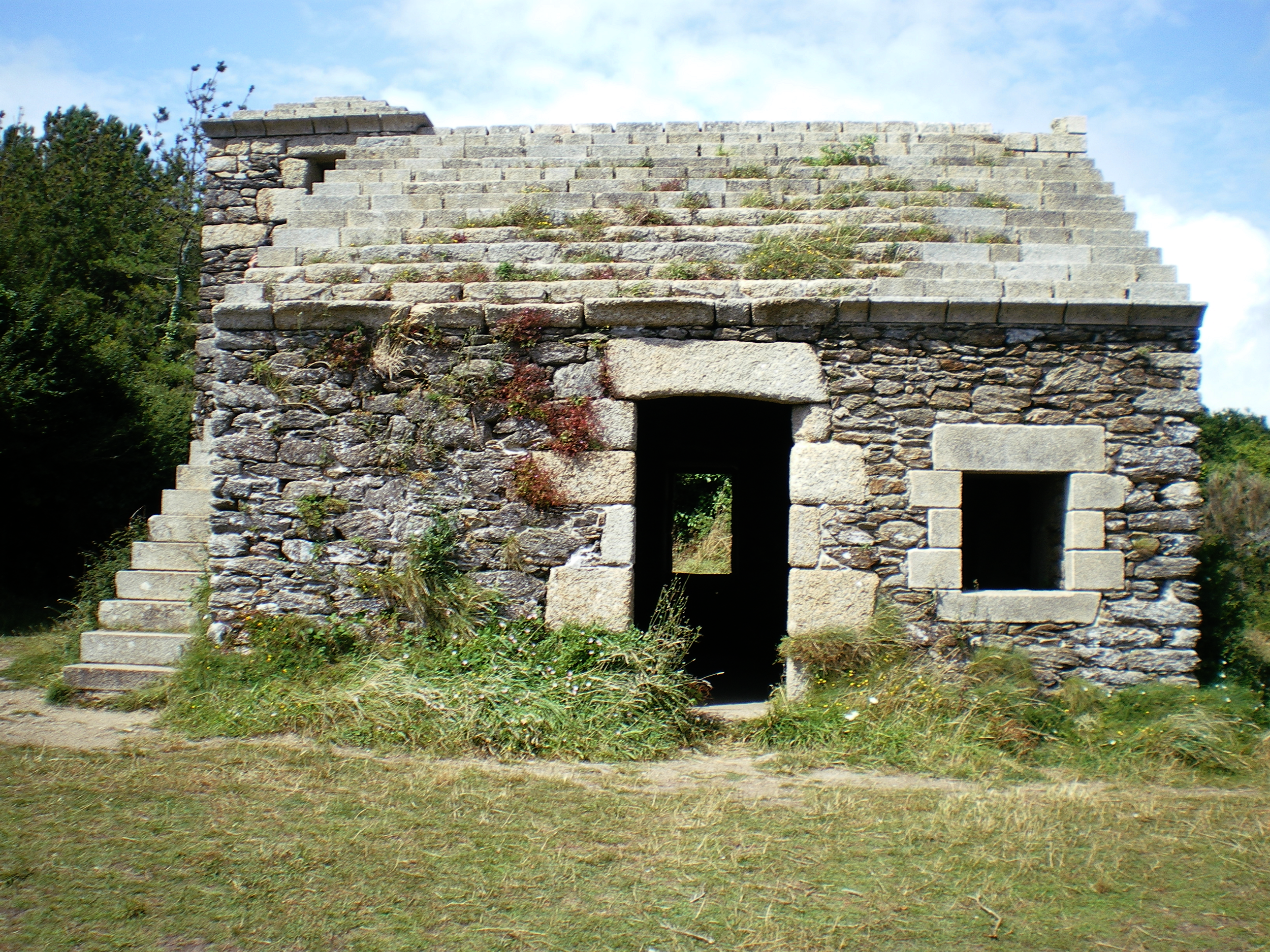 Corps de garde de Merrien, dit « maison des douaniers » ou « maison douanière », du XVIIe siècle (ria de Merrien, Moëlan-sur-Mer).